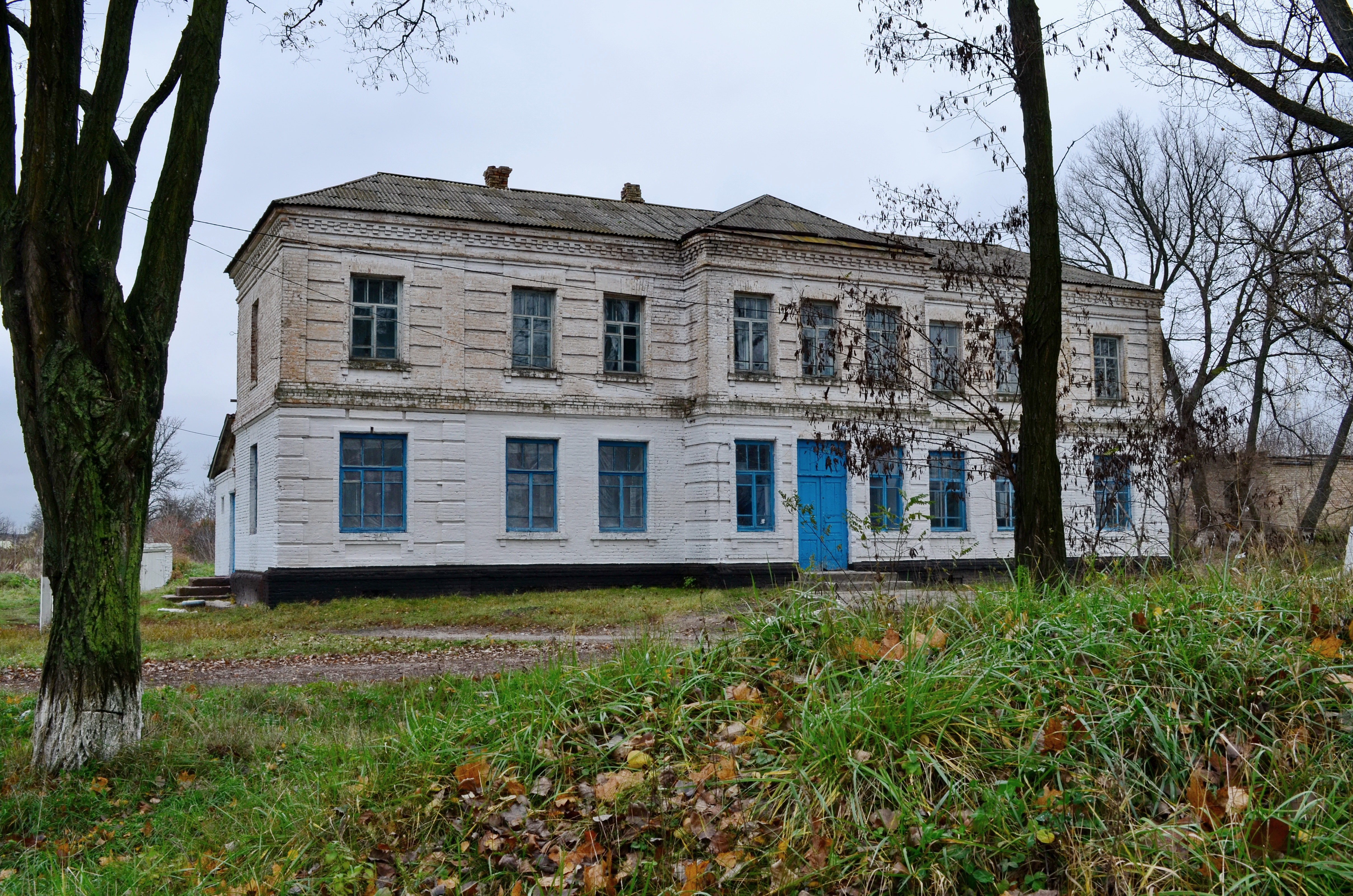 Комплекс споруд садиби поміщиці Семиградової, село Веселинівка